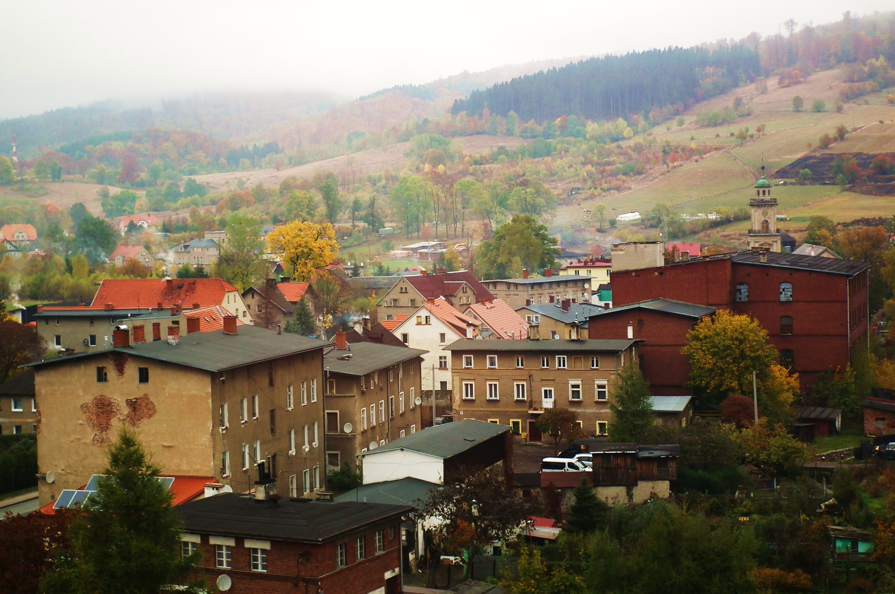 Widok na Głuszycę z wiaduktu kolejowego.